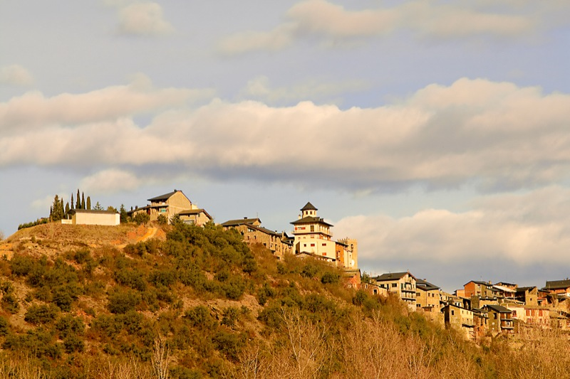 fotografia del poble de Montferrer del municipi de Montferrer i Castellbó